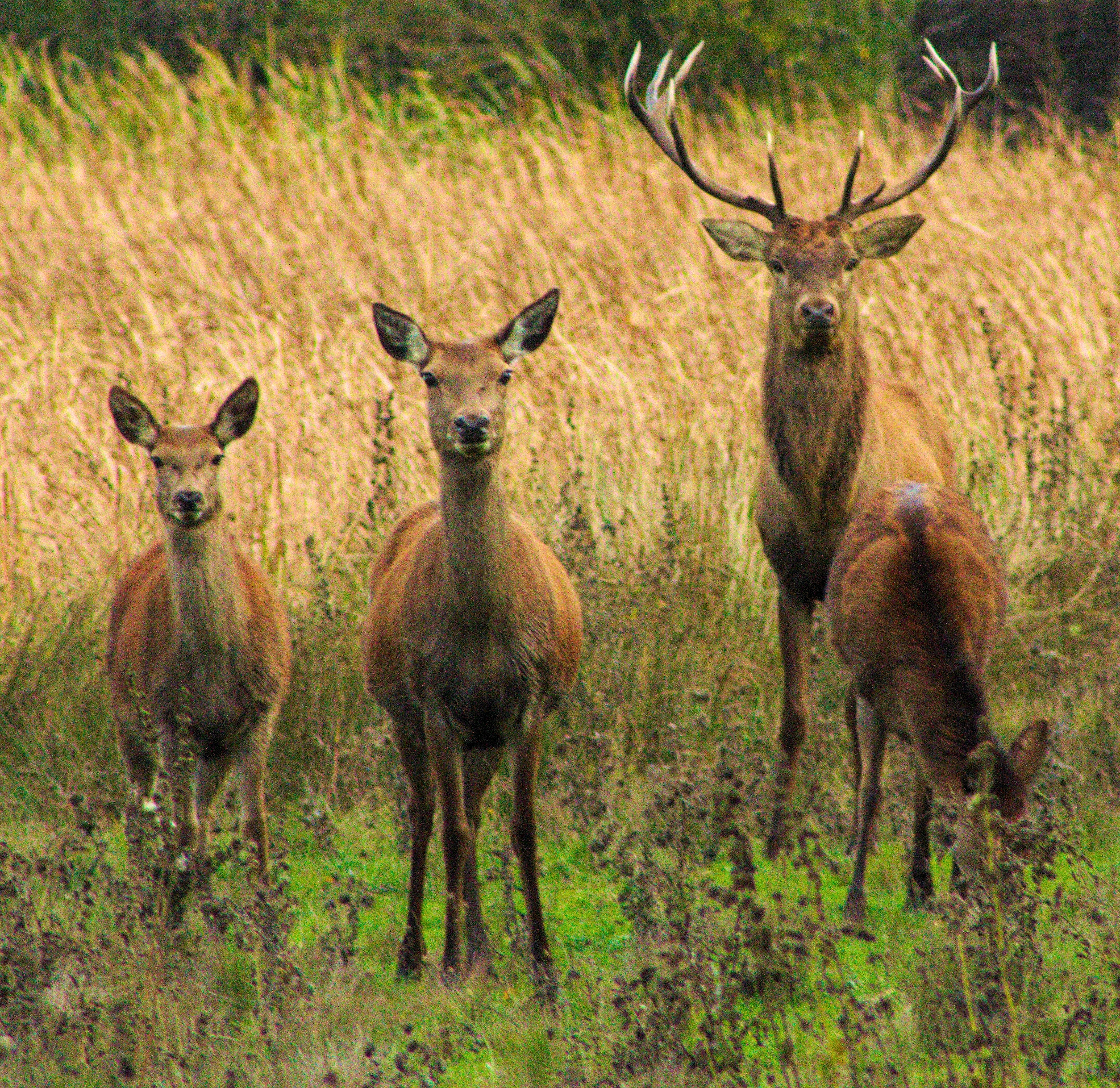 Grupo de ciervos, un macho y tres hembras, en el entorno de los humedales de Salburúa, en Vitoria.